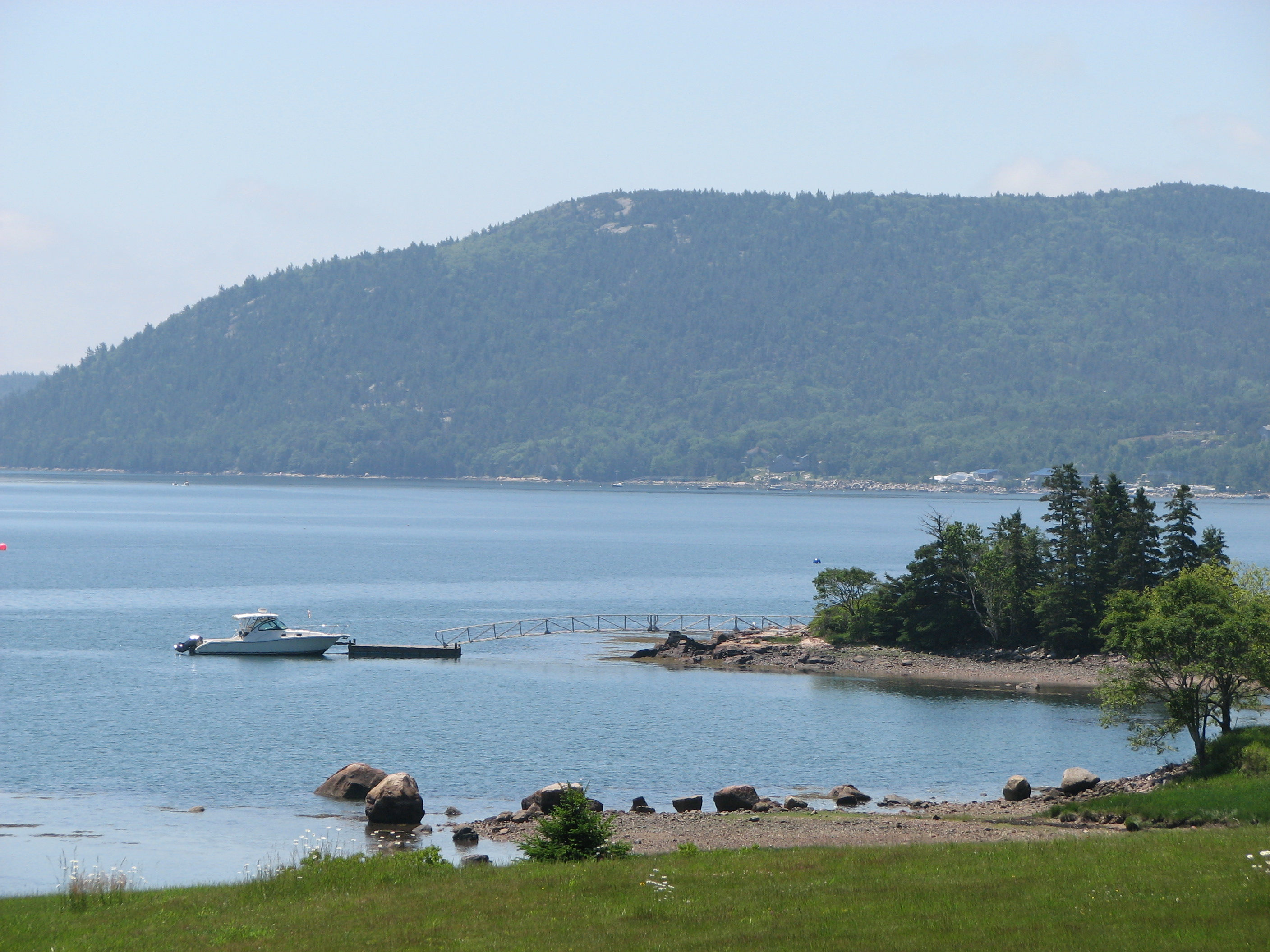 Le bras de mer de Somes Sound, dans l'île de Mount Desert Island